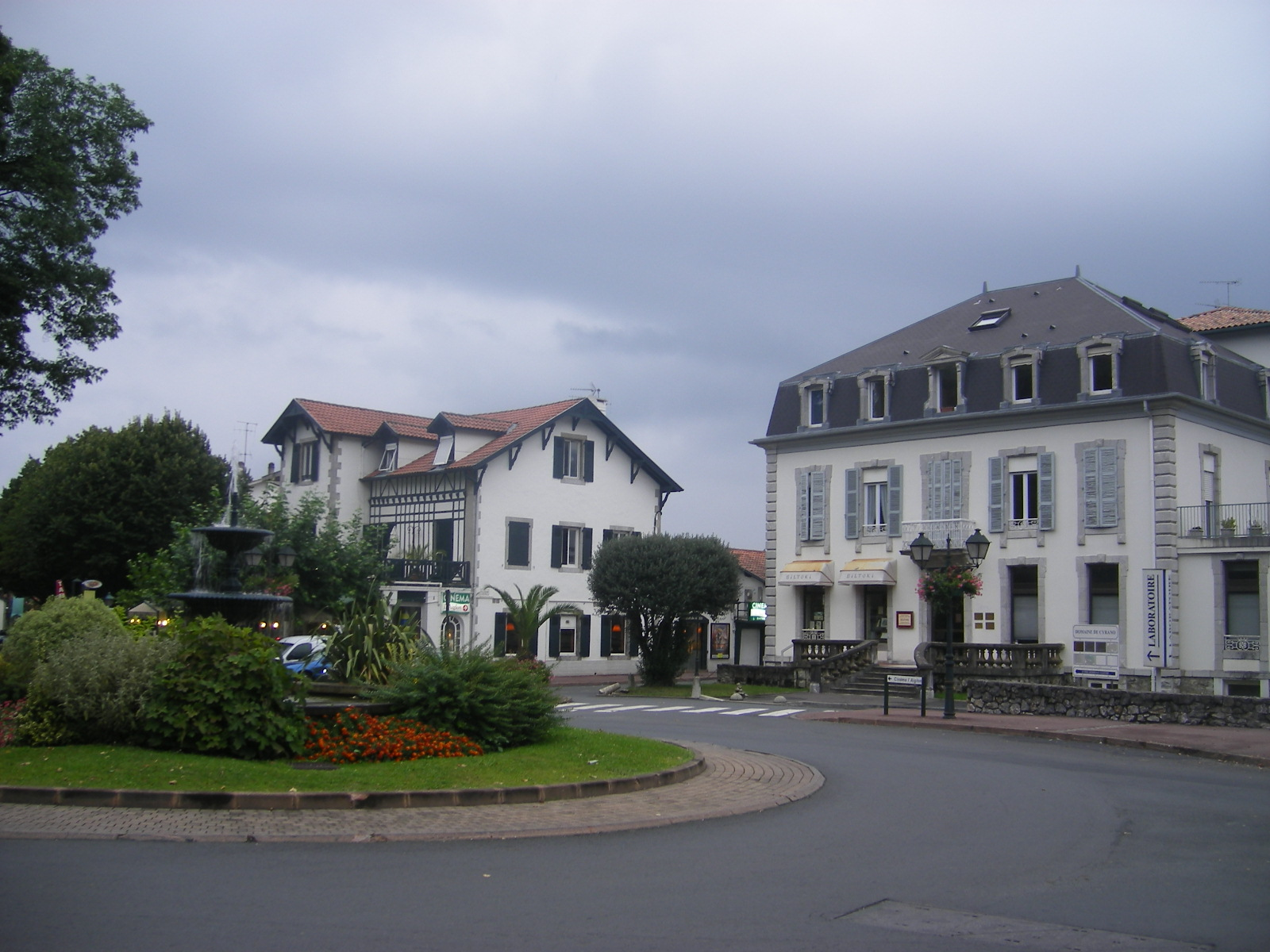 Cambo-les-Bains